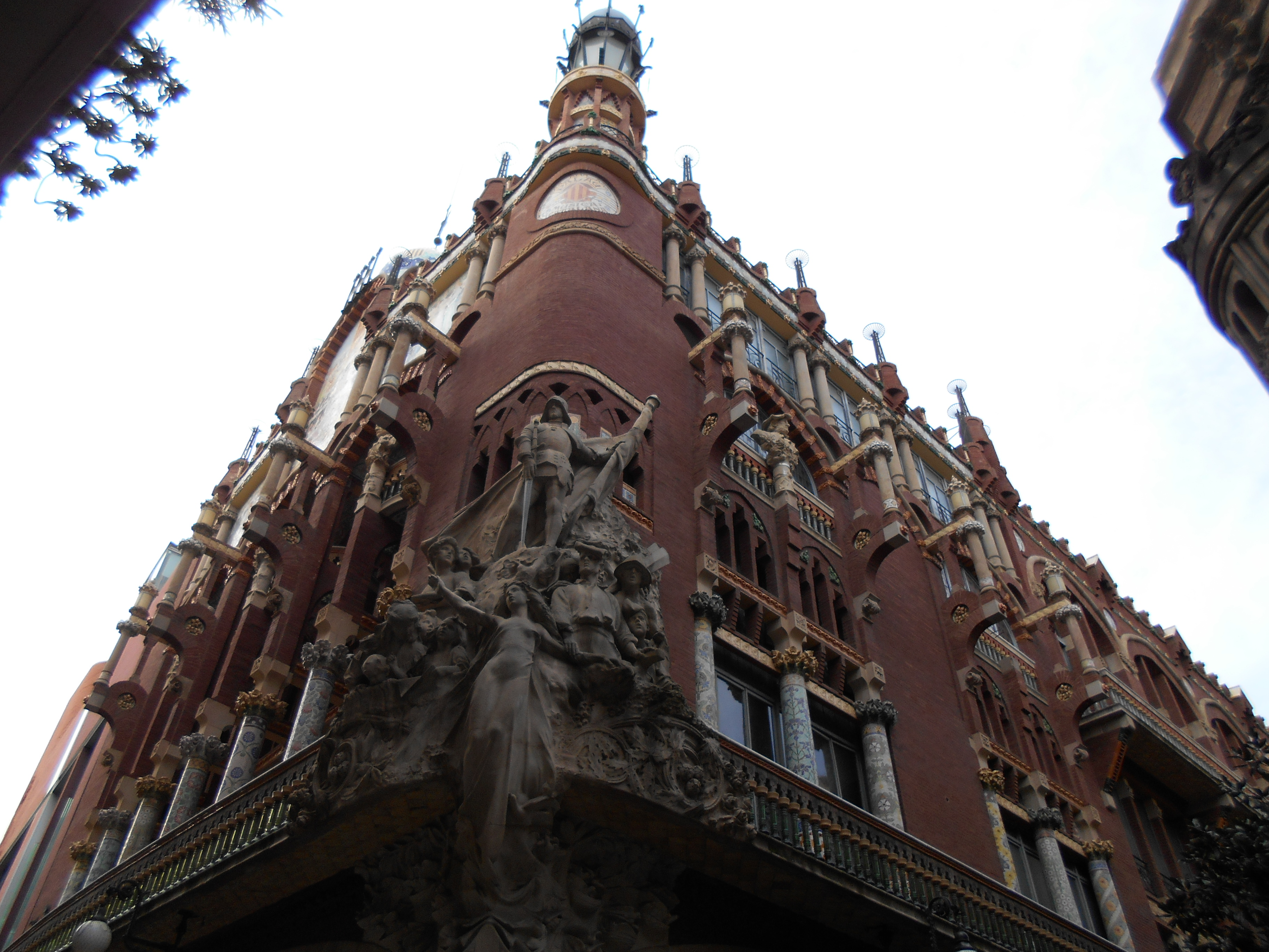 Palacio de la Música Catalana.